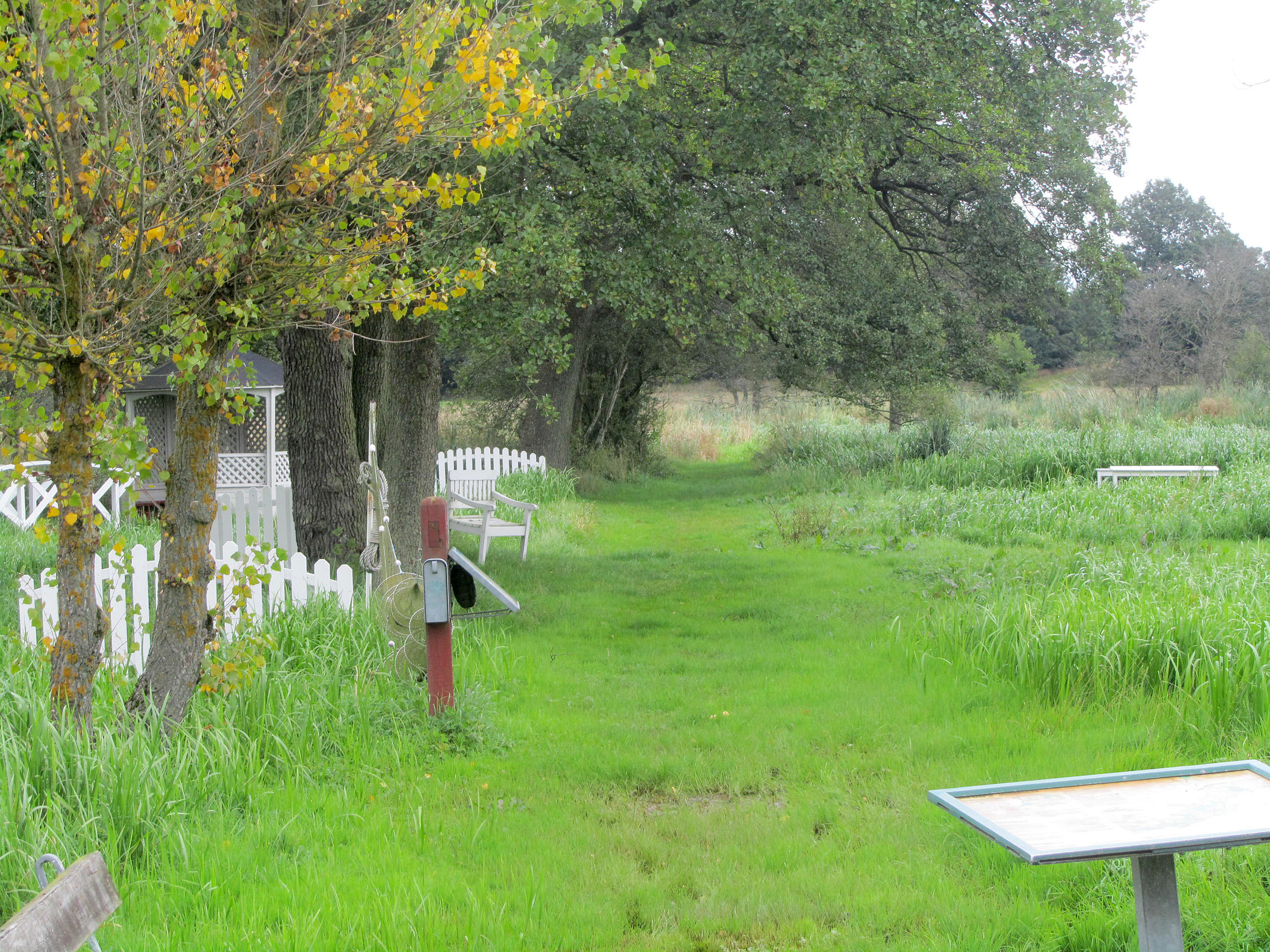 Trækstien langs Gudenåen ved Svostrup Kro